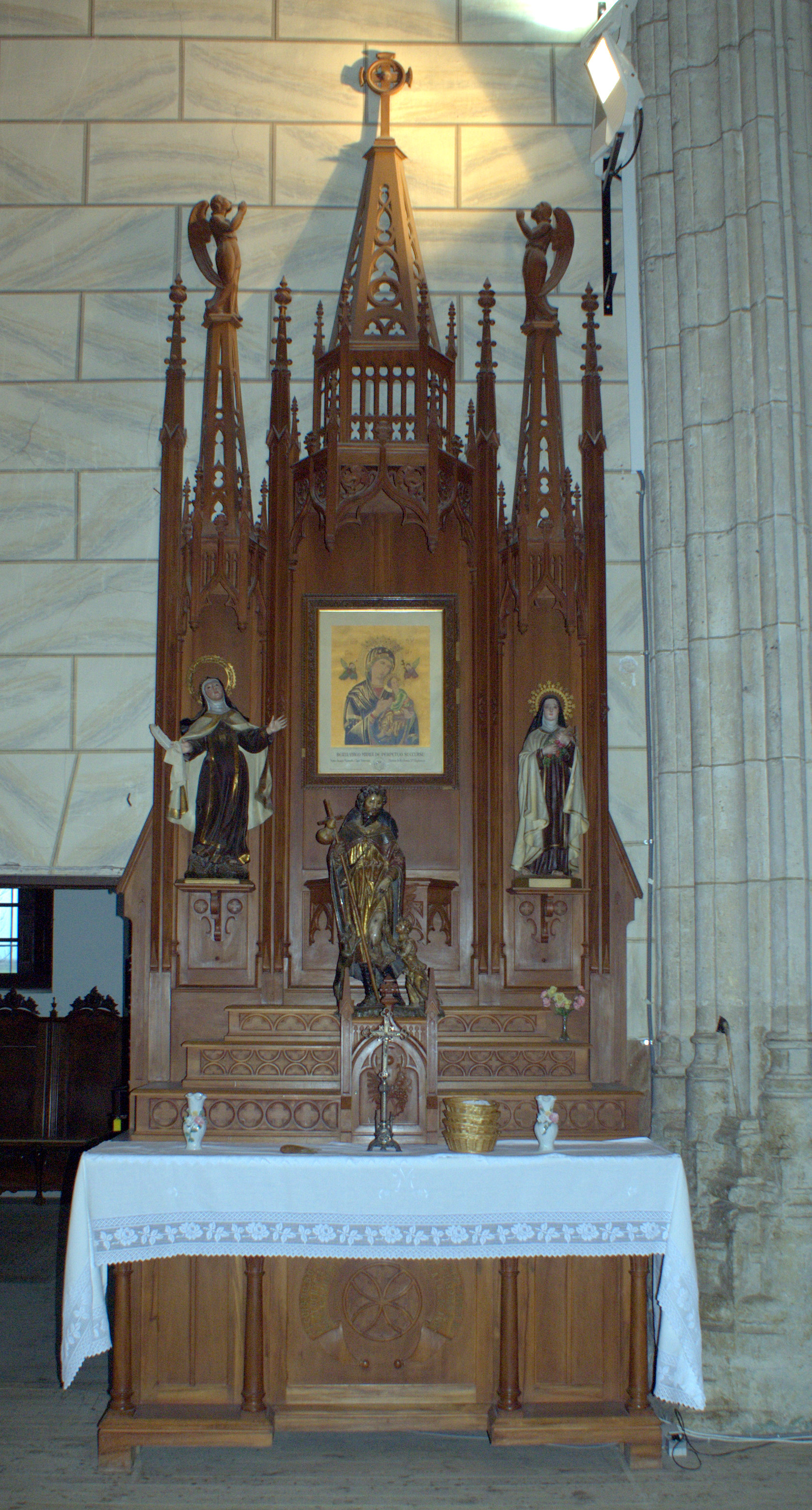 Altar del Perpetuo Socorro en la iglesia de Santa María Magdalena de Matapozuelos, Valladolid, España.